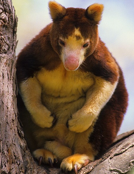 Dendrolagus matschiei Matschie's Tree-kangaroo